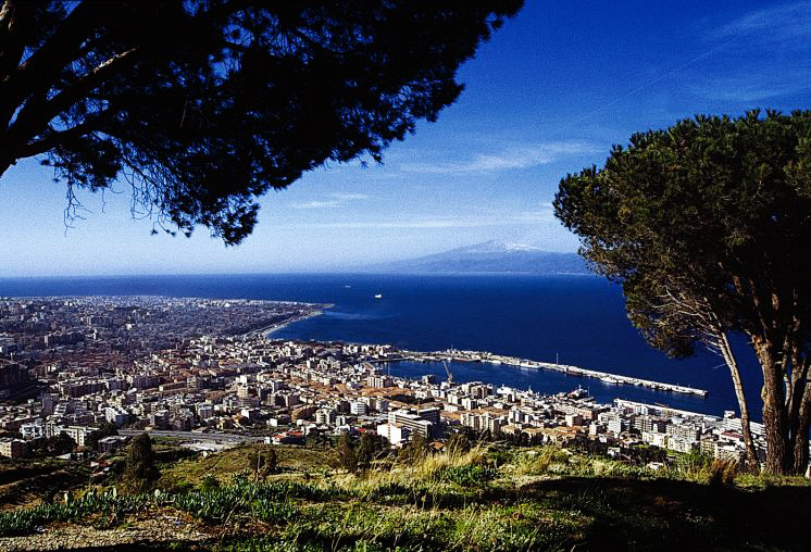 veduta di Reggio Calabria, view of Reggio Calabria